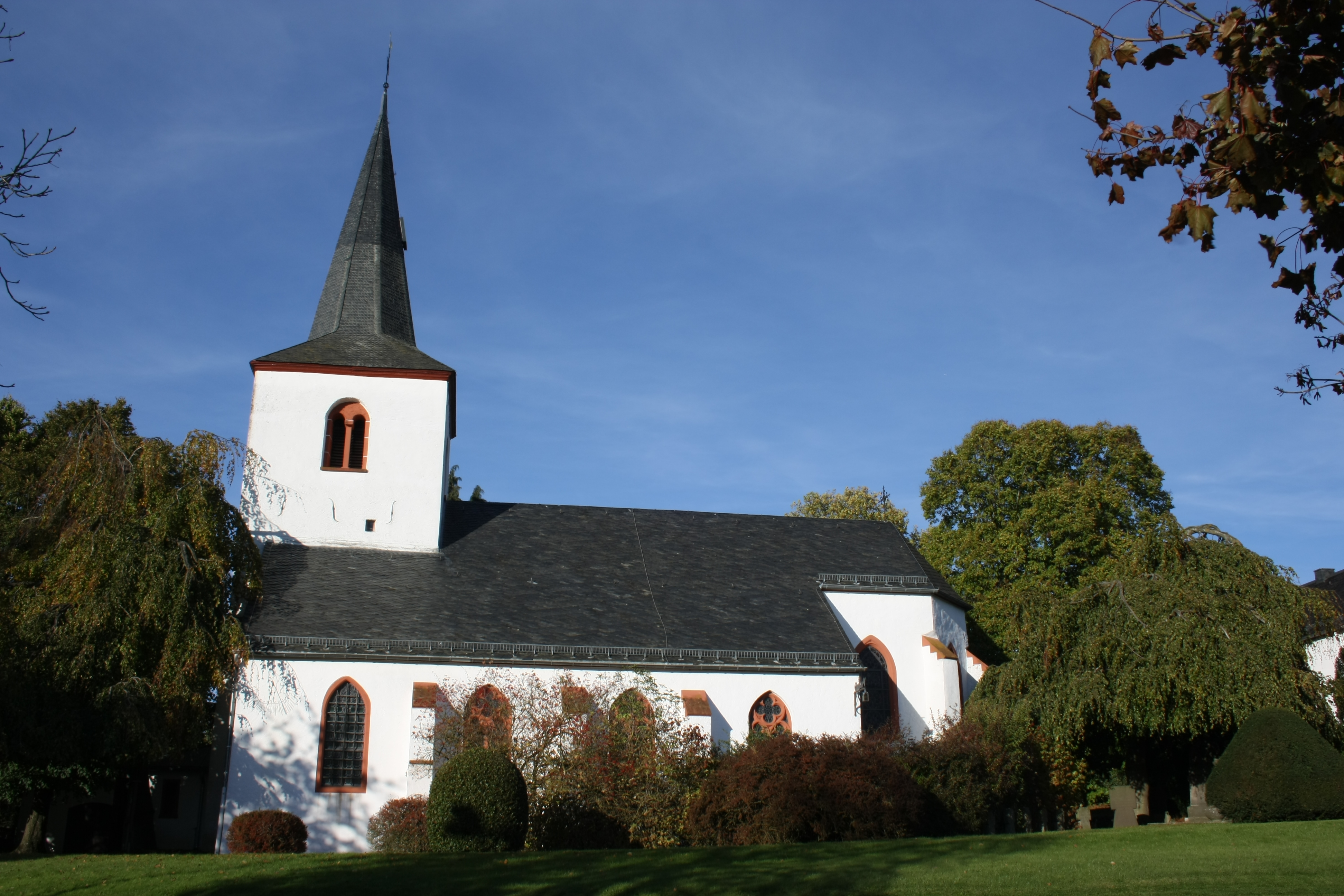 katholische Pfarrkirche St. Philippus und Jakobus in Lommersdorf, Ansicht von Süden